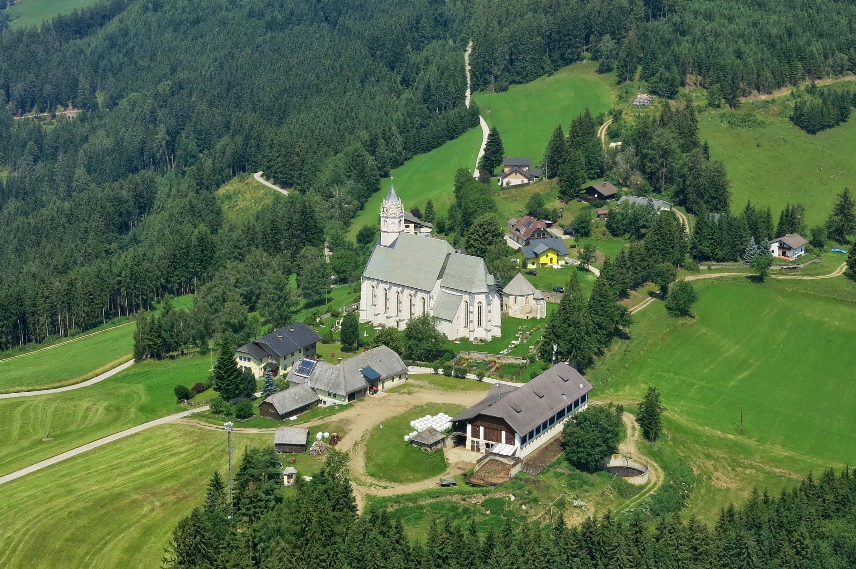 Kath. Pfarrkirche und Wallfahrtskirche Unsere Liebe Frau, Karner und Friedhof